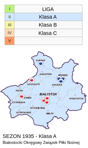 Jagiellonia w sezonie 1935 - mapa